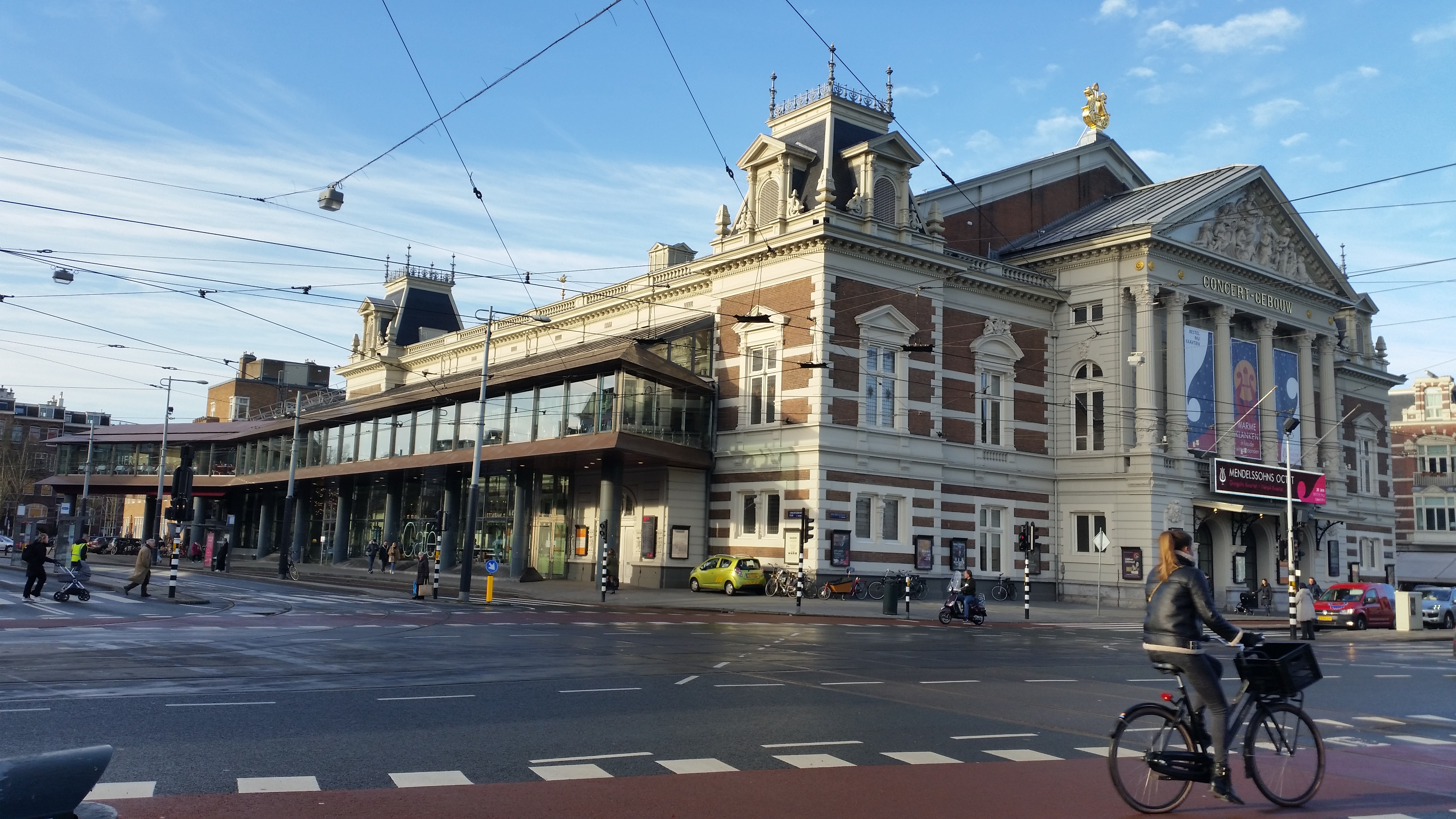 Concertgebouw